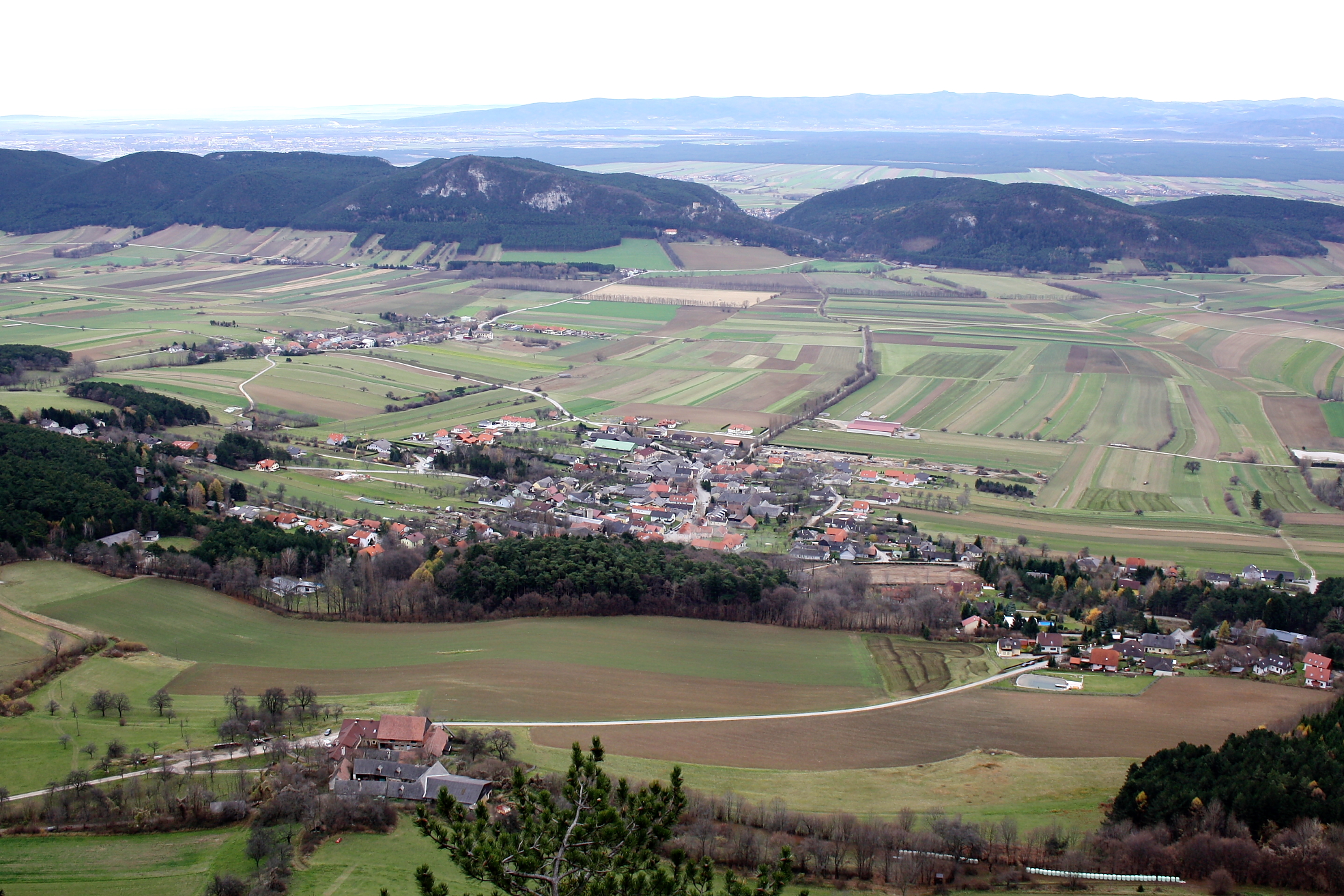 Das Dorf und die Katastralgemeinde Stollhof in der niederösterreichischen Gemeinde Hohe Wand; Nordwestansicht (von der Hohen Wand). Links hinter Stollhof das Dorf Gaaden und links hinter der Hügelkette die Bezirkshauptstadt Wiener Neustadt.